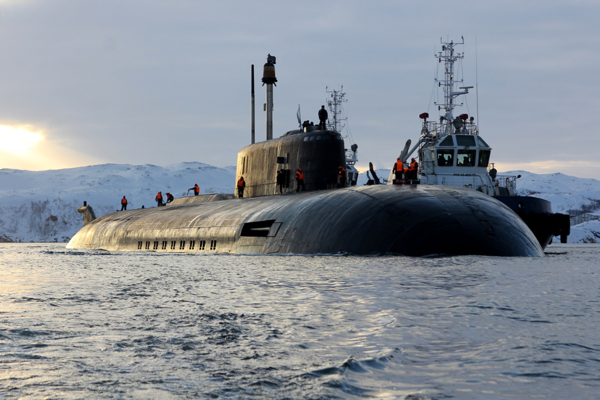 Прибытие атомного подводного ракетного крейсера Северного флота «Орёл» в пункт постоянного базирования после завершения планового ремонта (Мурманская обл.)